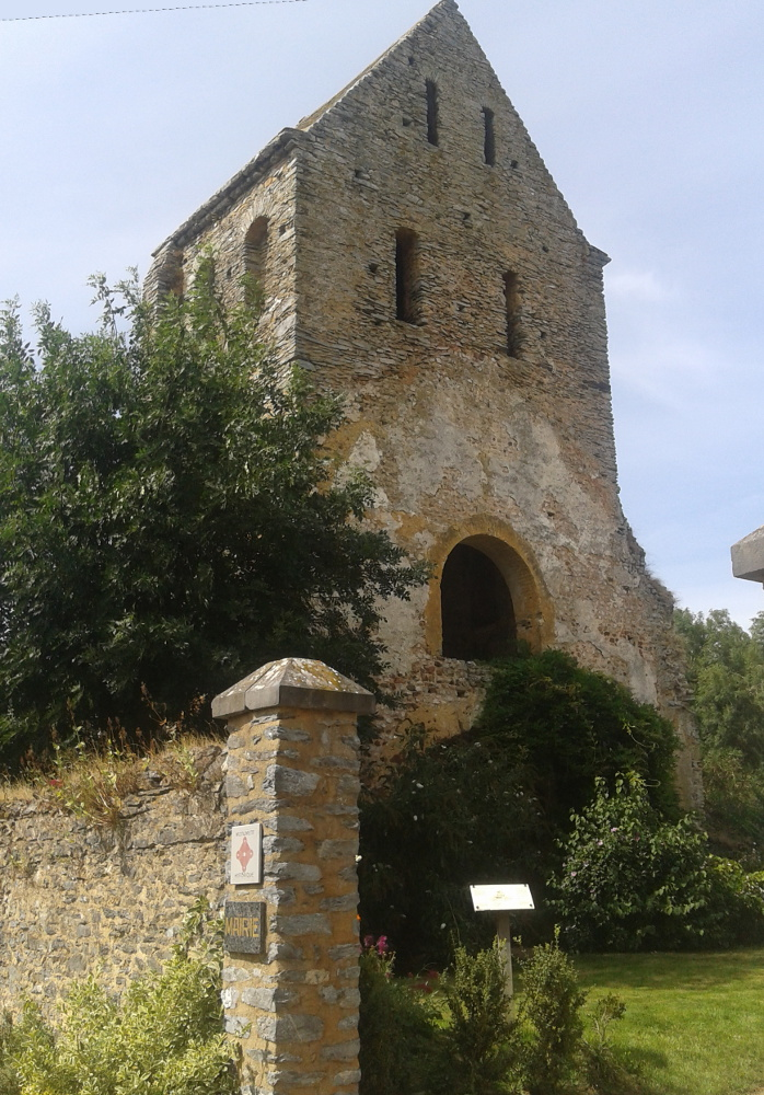 Tour de l'ancienne église de La Cropte .